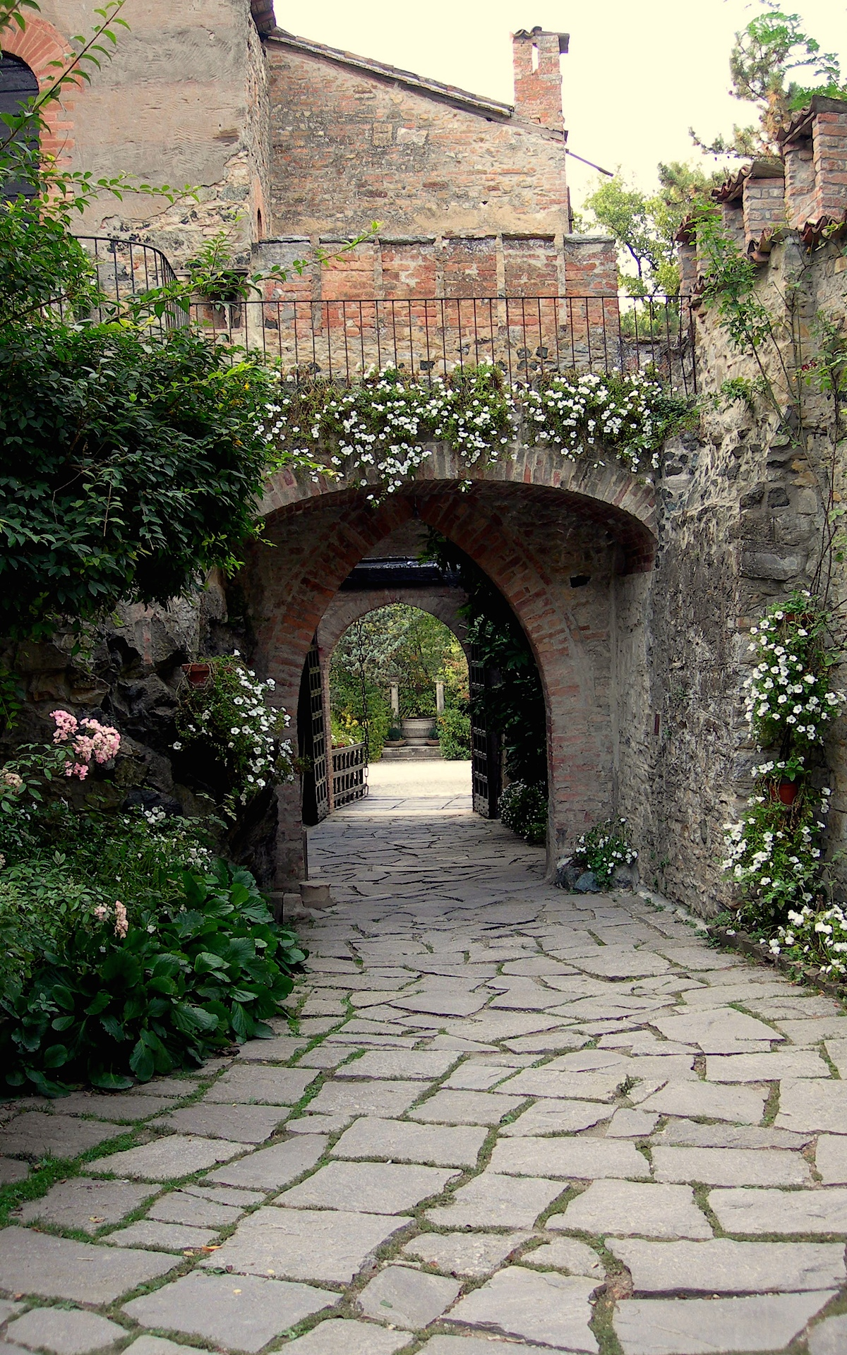 Castello di Gropparello - MIBAC This is a photo of a monument which is part of cultural heritage of Italy.